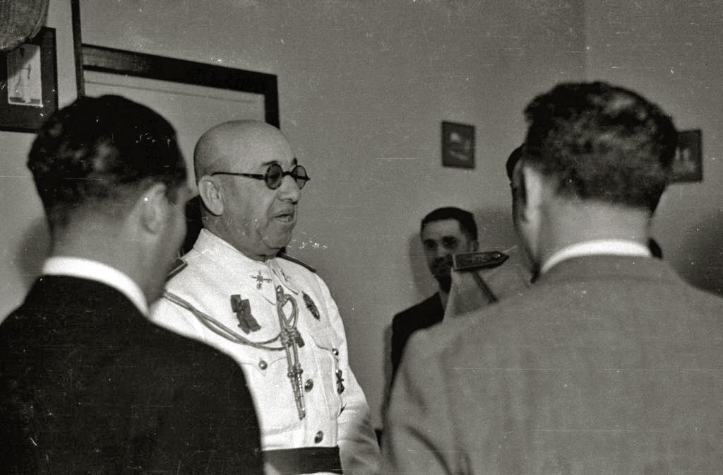 El general Moscardó presenciando un partido de pelota en el frontón de Gros de San Sebastián (España) en 1941